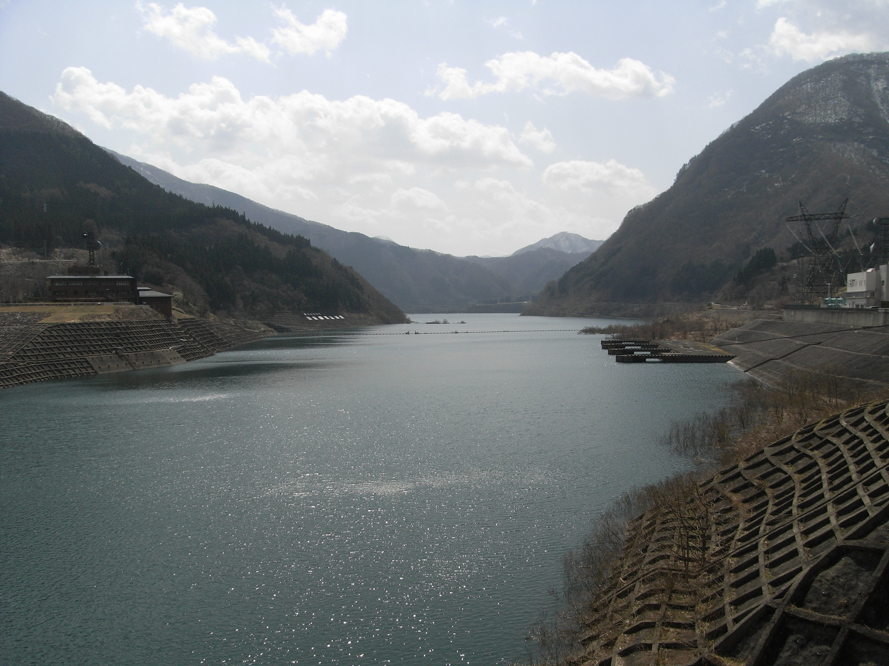 Dam